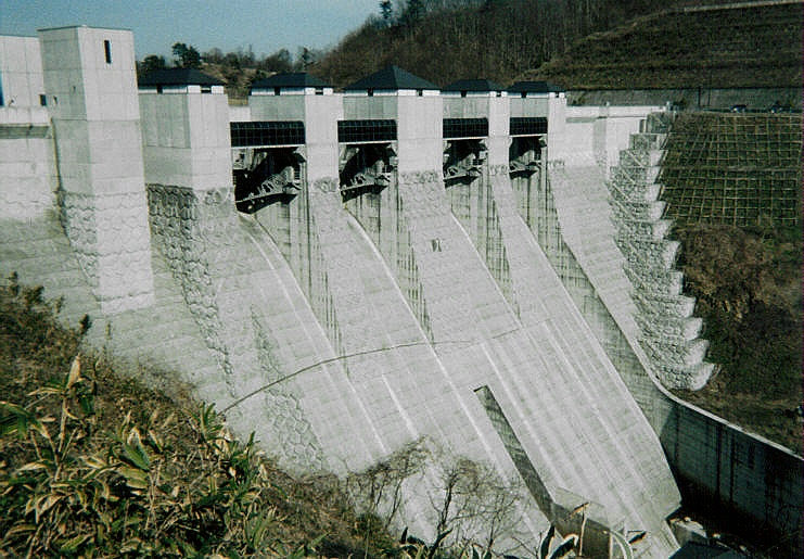 Dam